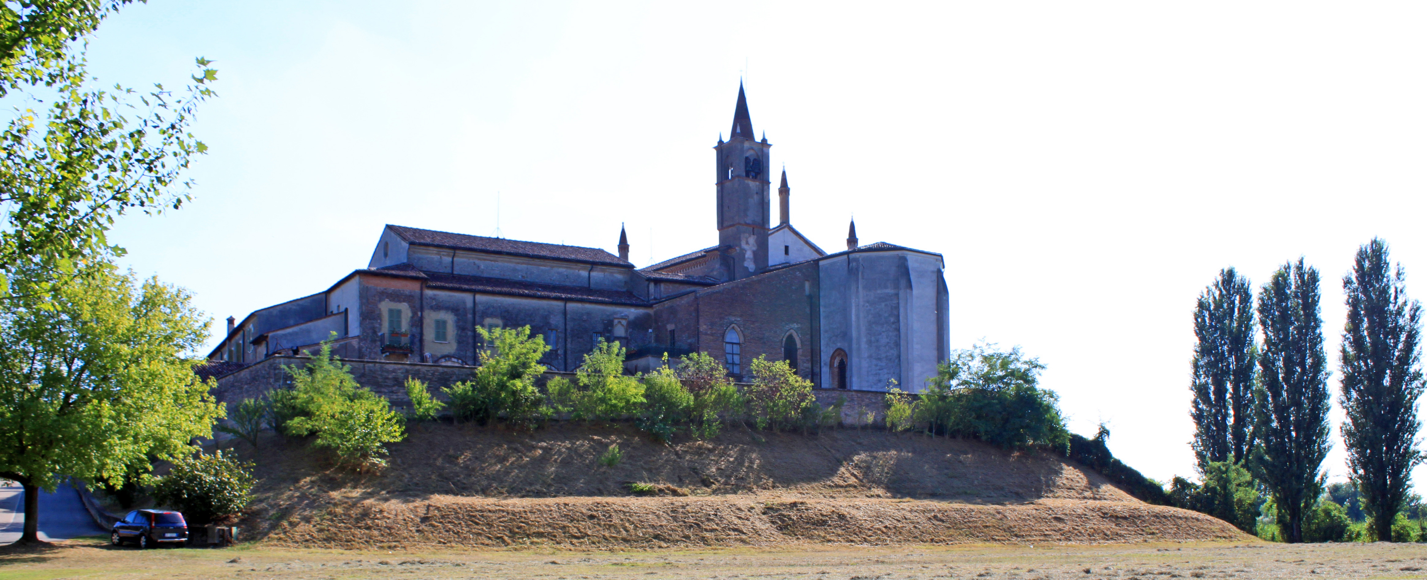 Santuario di Santa Maria delle Grazie